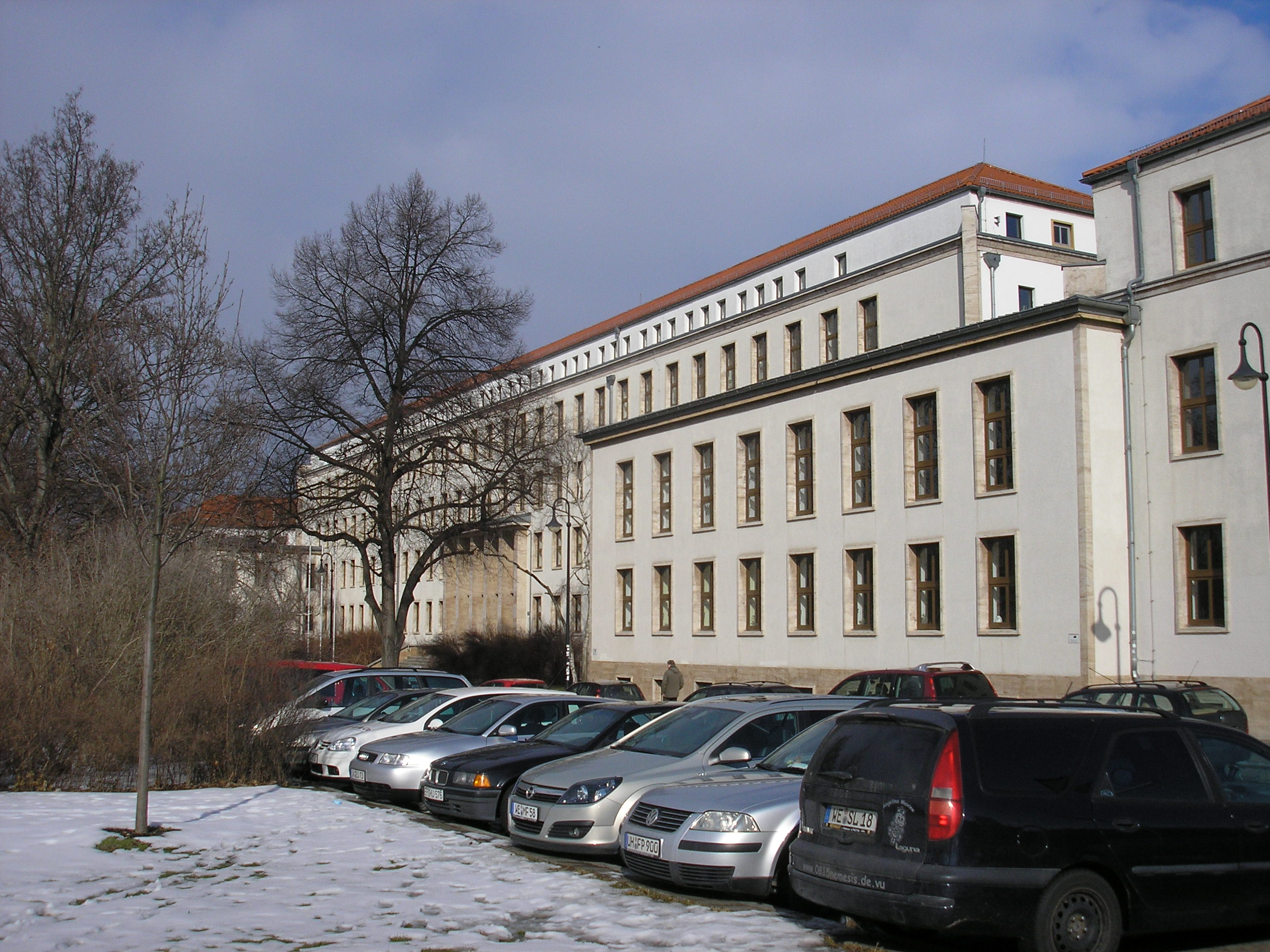 Verwaltungsgebäude - Beethovenstraße 3, Erfurt, Thüringen, Deutschland